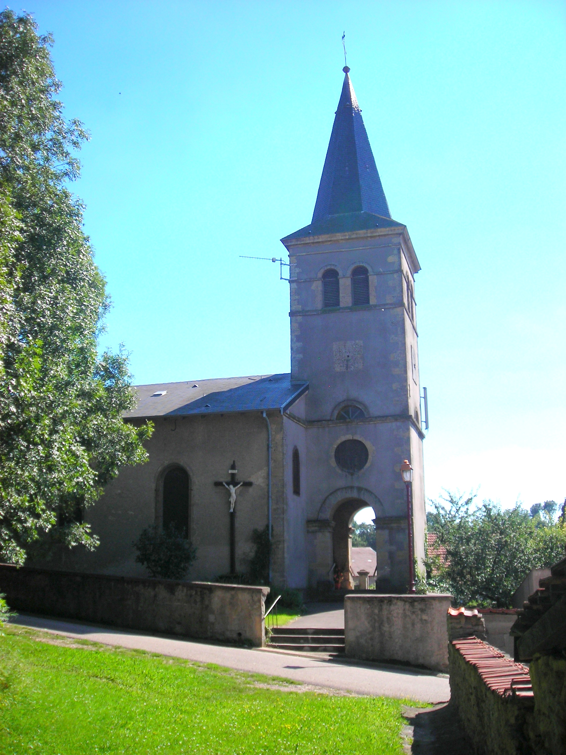 Eglise paroissiale du village de Niedervisse (Moselle, France)